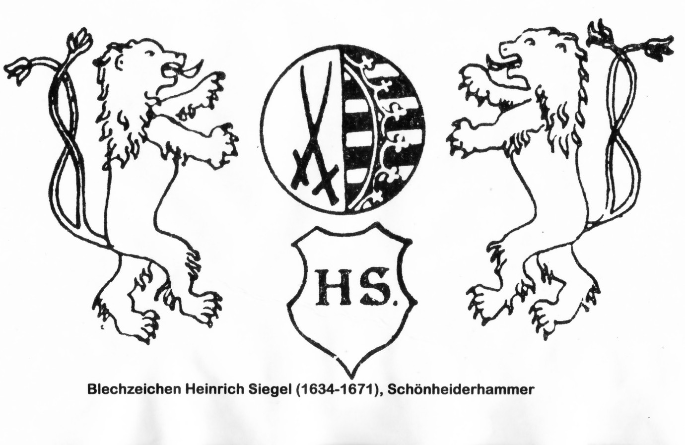 Schönheiderhammer: Blechzeichen des Hammerherrn Heinrich Siegel (1634 bis 1671), Nachzeichnung nach Siegfried Sieber: Die Bergbaulandschaft von Schneeberg und Eibenstock, Ergebnisse der heimatkundlichen Bestandsaufnahme im Gebiet von Schneeberg und Eibenstock, in: Werte der deutschen Heimat, Band 11, Akademie-Verlag, Berlin 1967, S. 163